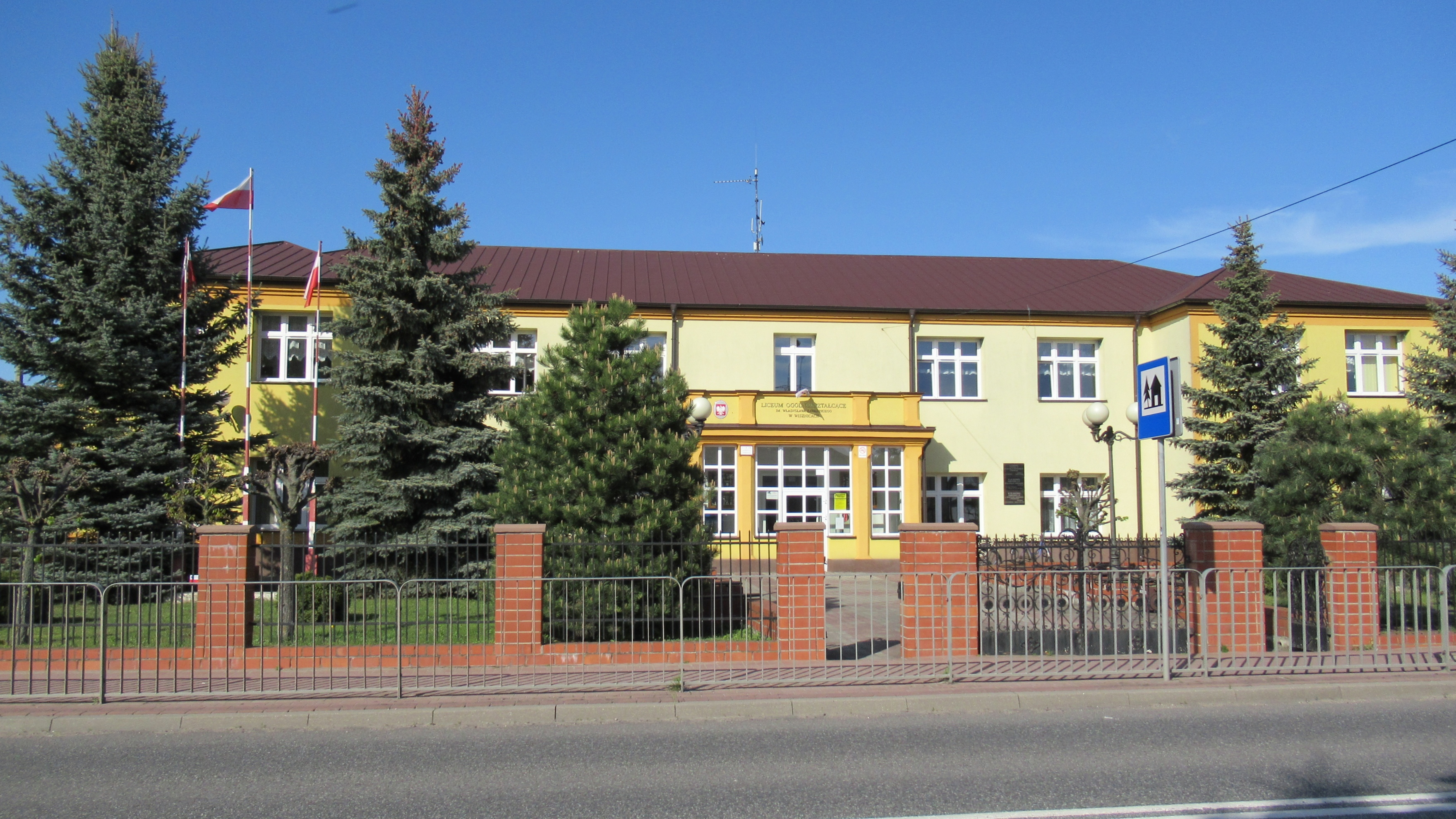 Wisznice (pow. bialski, woj. lubelskie, Polska). Liceum.